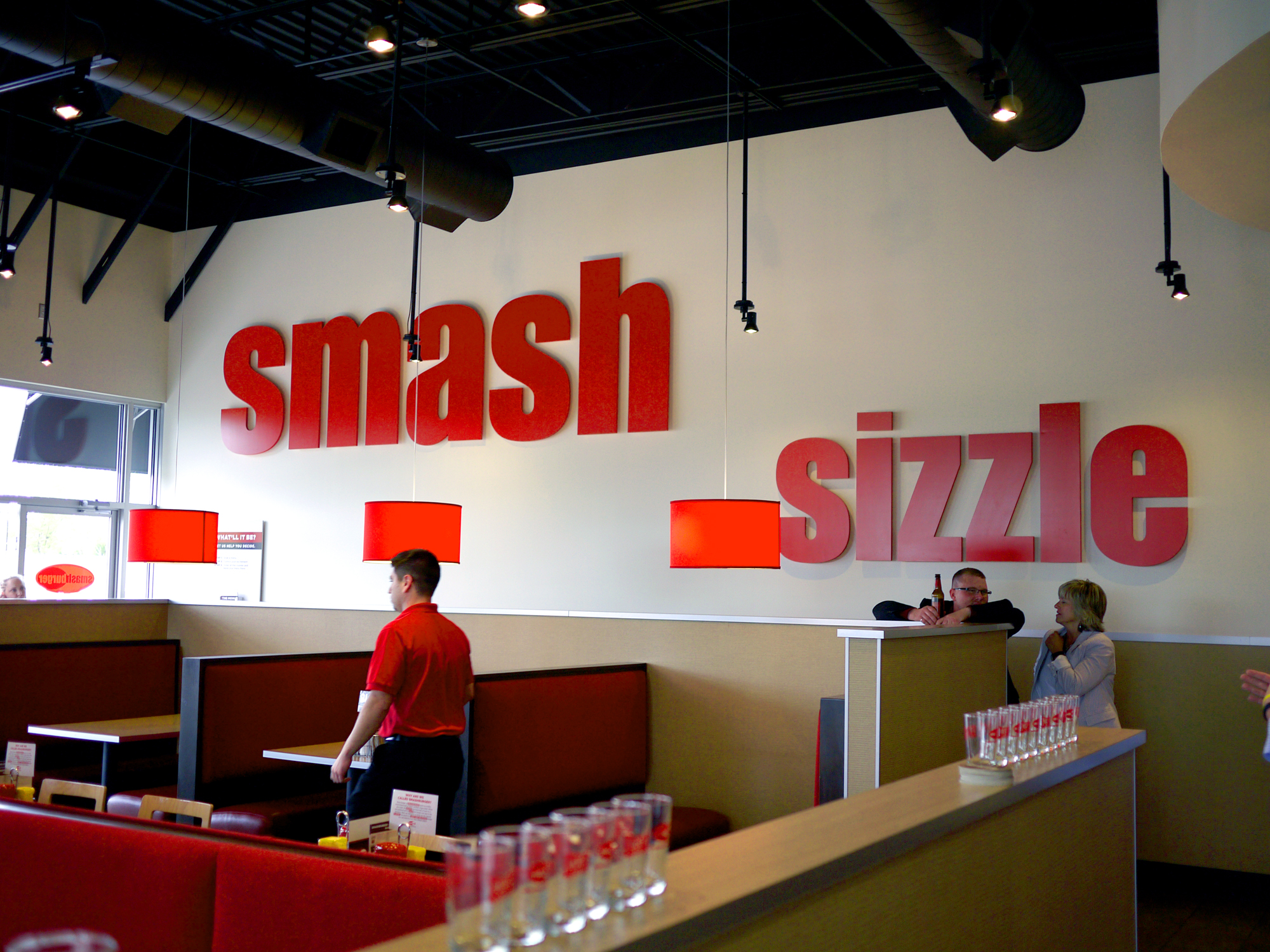 Smashburger